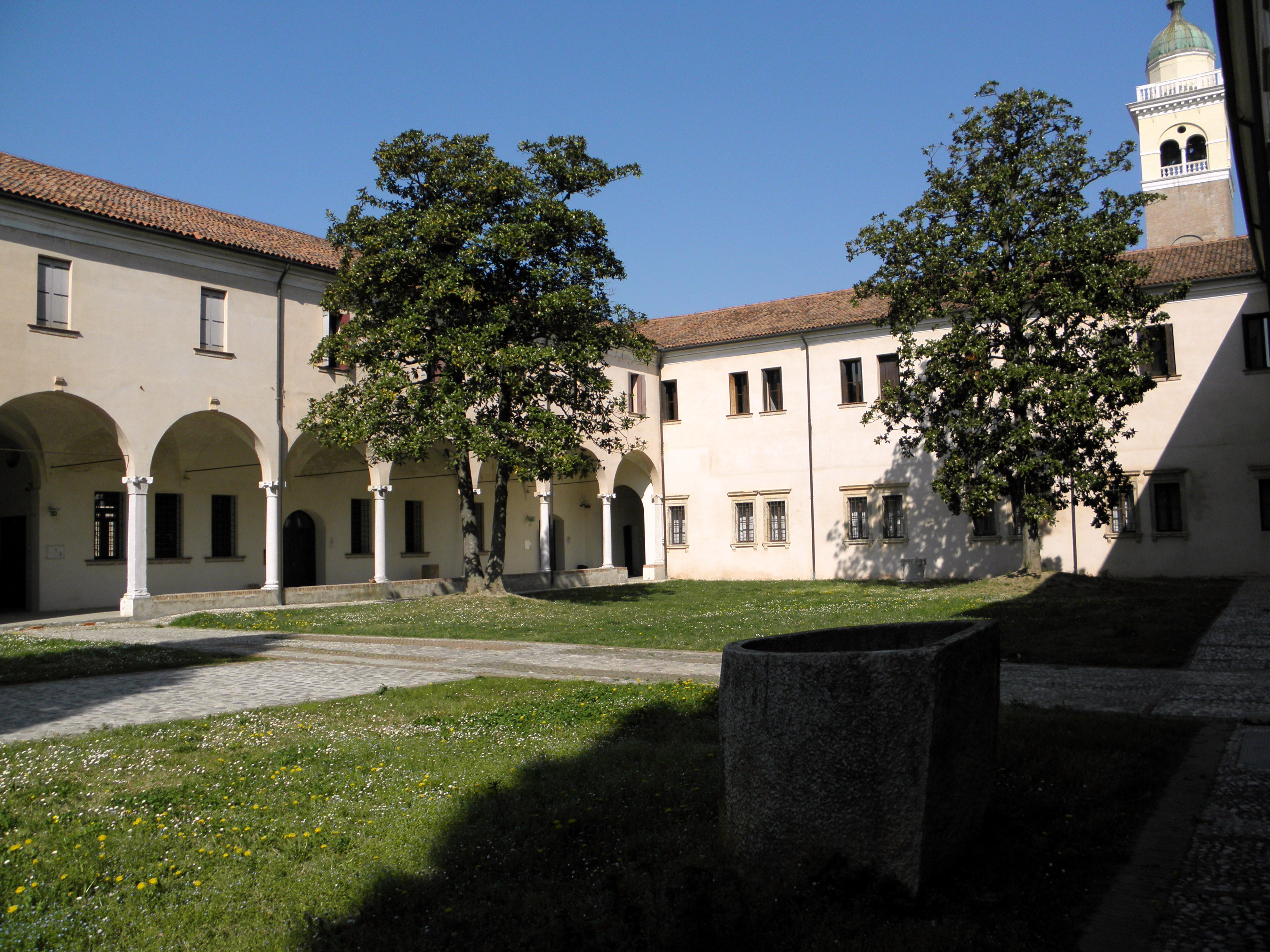 Rovigo, ex Monastero degli Olivetani: vista del cortile e del colonnato. Visibile anche il campanile della confinante chiesa parrocchiale di San Bartolomeo.